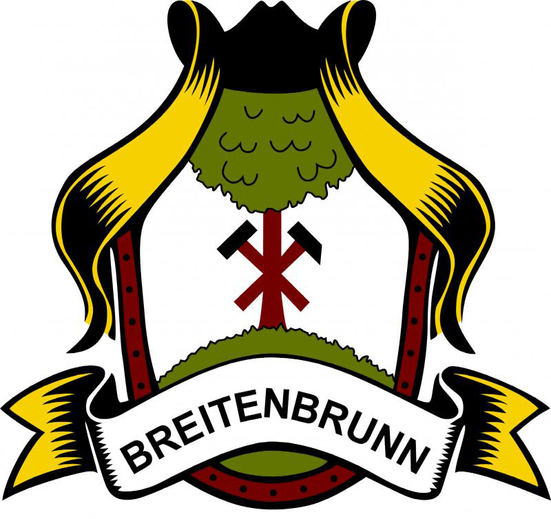 Coat of arms of Breitenbrunn/Erzgeb.